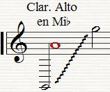 Etendue de l'instrument. Notes réelles (en ut) entendues. Les notes sur la partition sont écrites une sixte majeure au-dessus. La ronde en rouge est le LA(3) à 440 Hz.